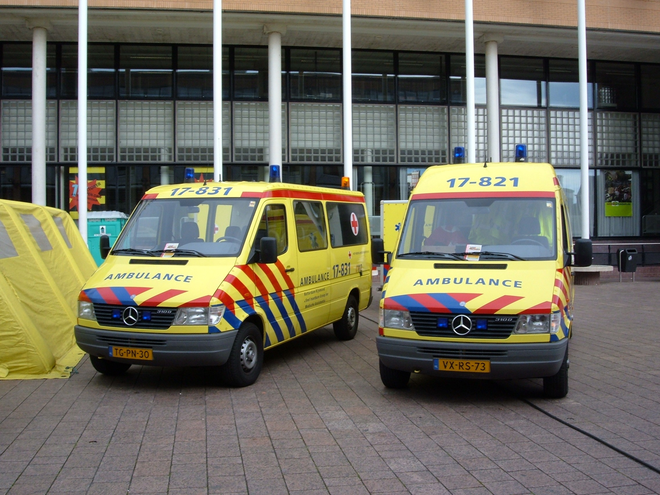 Voertuigen Geneeskundige Combinatie Nieuwe Waterweg Noord. Links het voertuig van het SIGMA-team, rechts het voertuig van het Ambu-team.